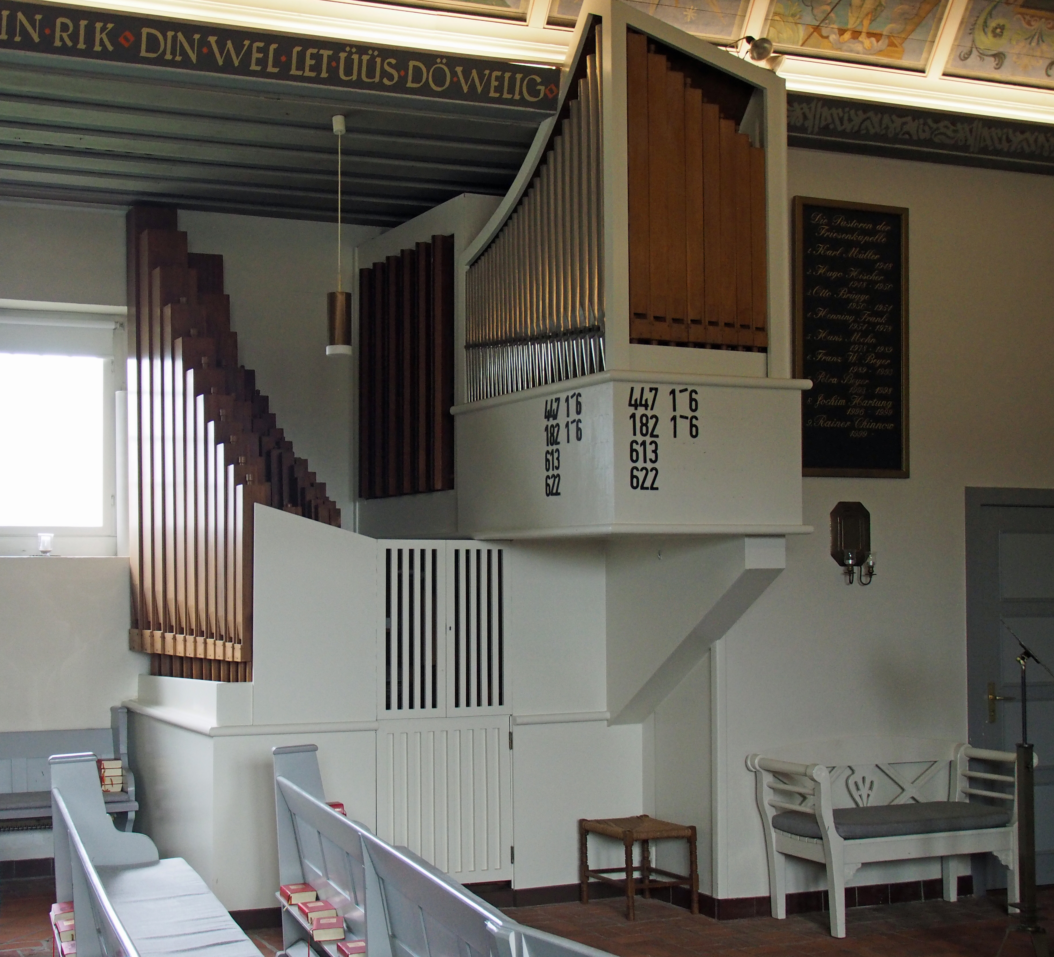 Orgel der Friesenkapelle in Wenningstedt (Sylt)